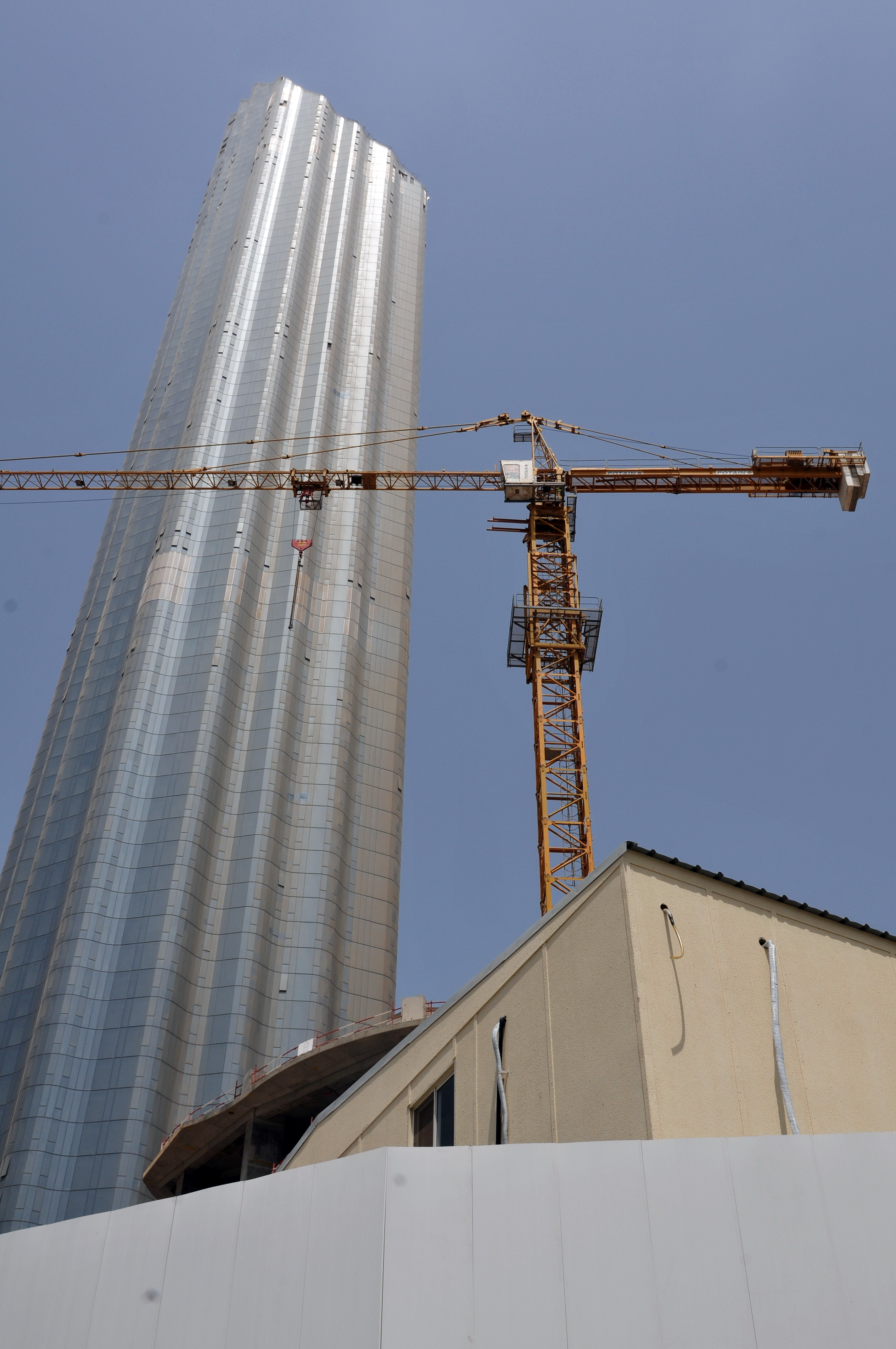 travel to Wikimania 2013: Abu Dhabi